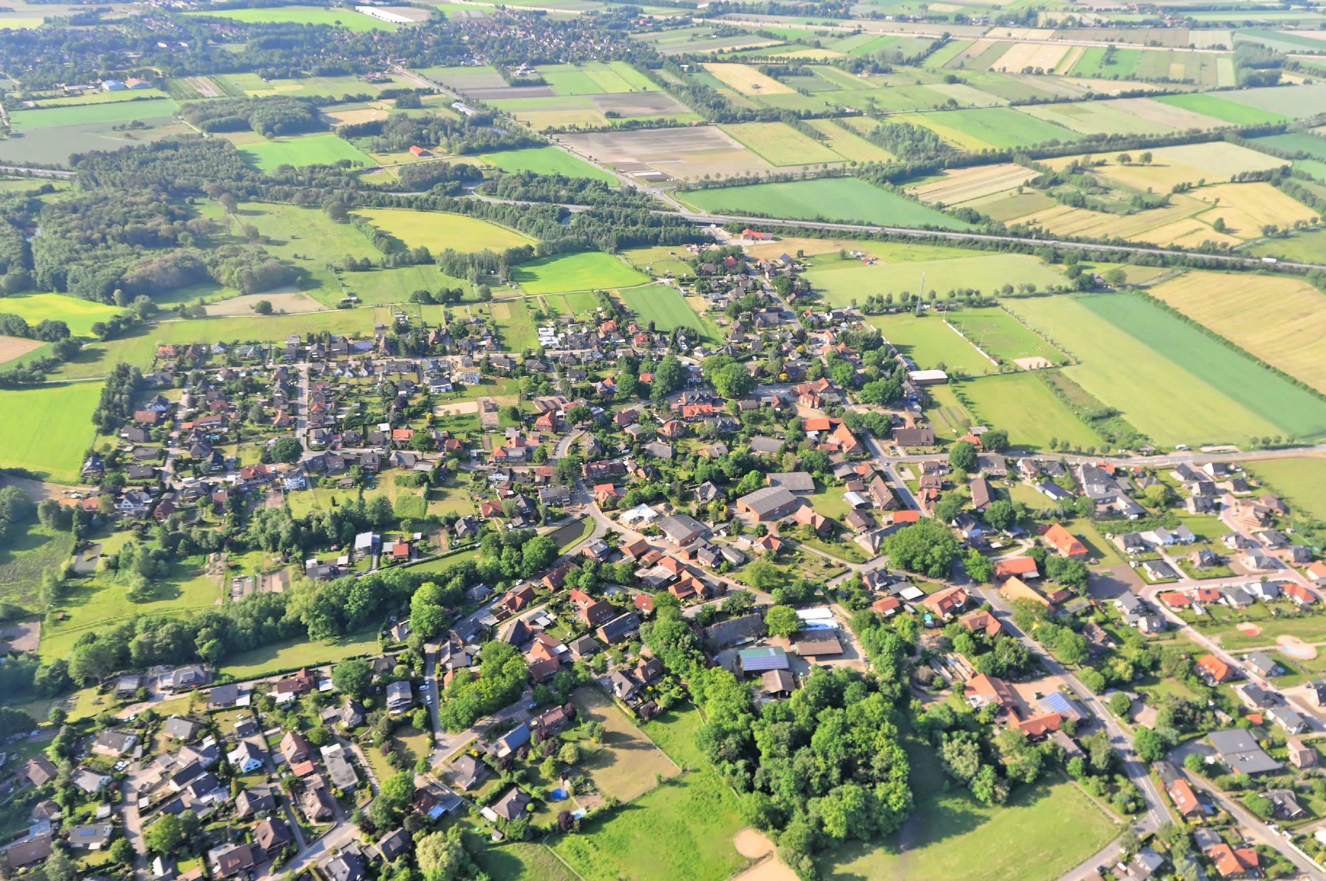 Überführungsflug vom Flugplatz Nordholz-Spieka über Lüneburg, Potsdam zum Flugplatz Schwarzheide-Schipkau